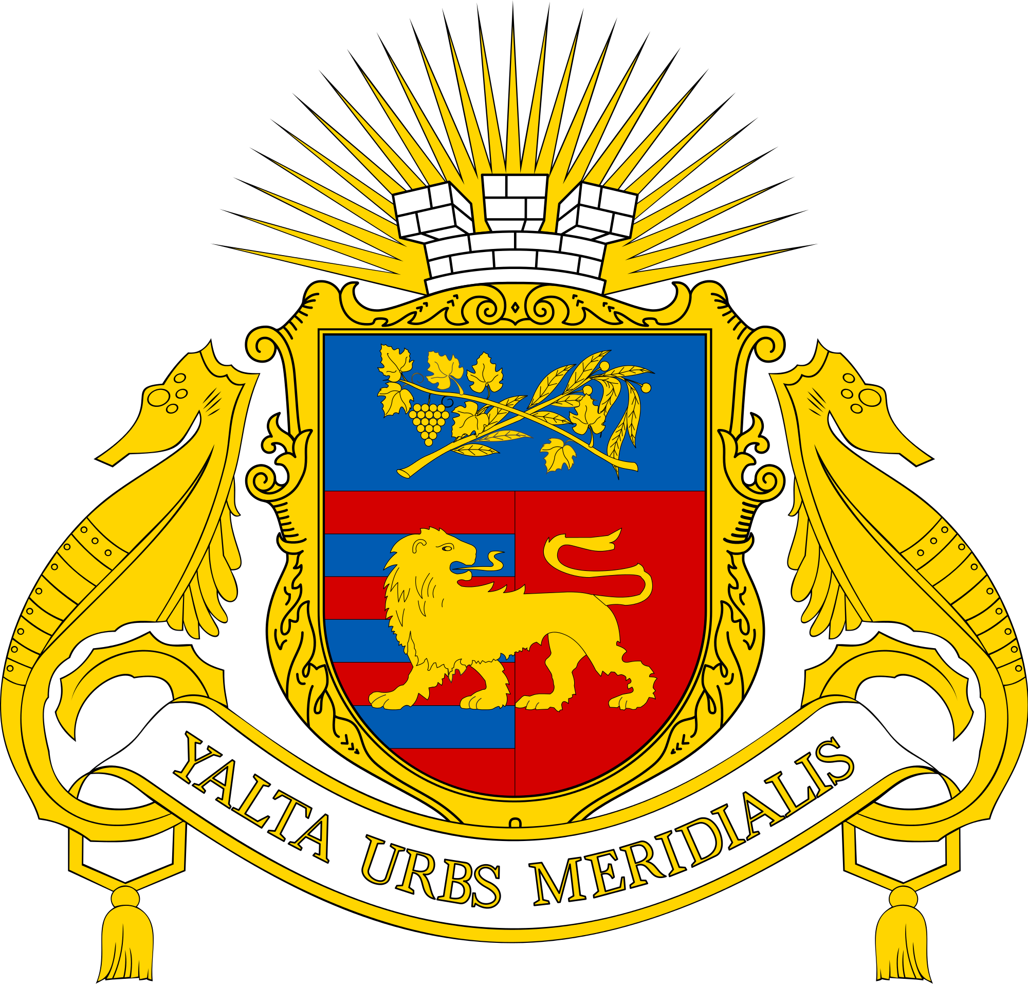 Герб міста Ялта, Україна.